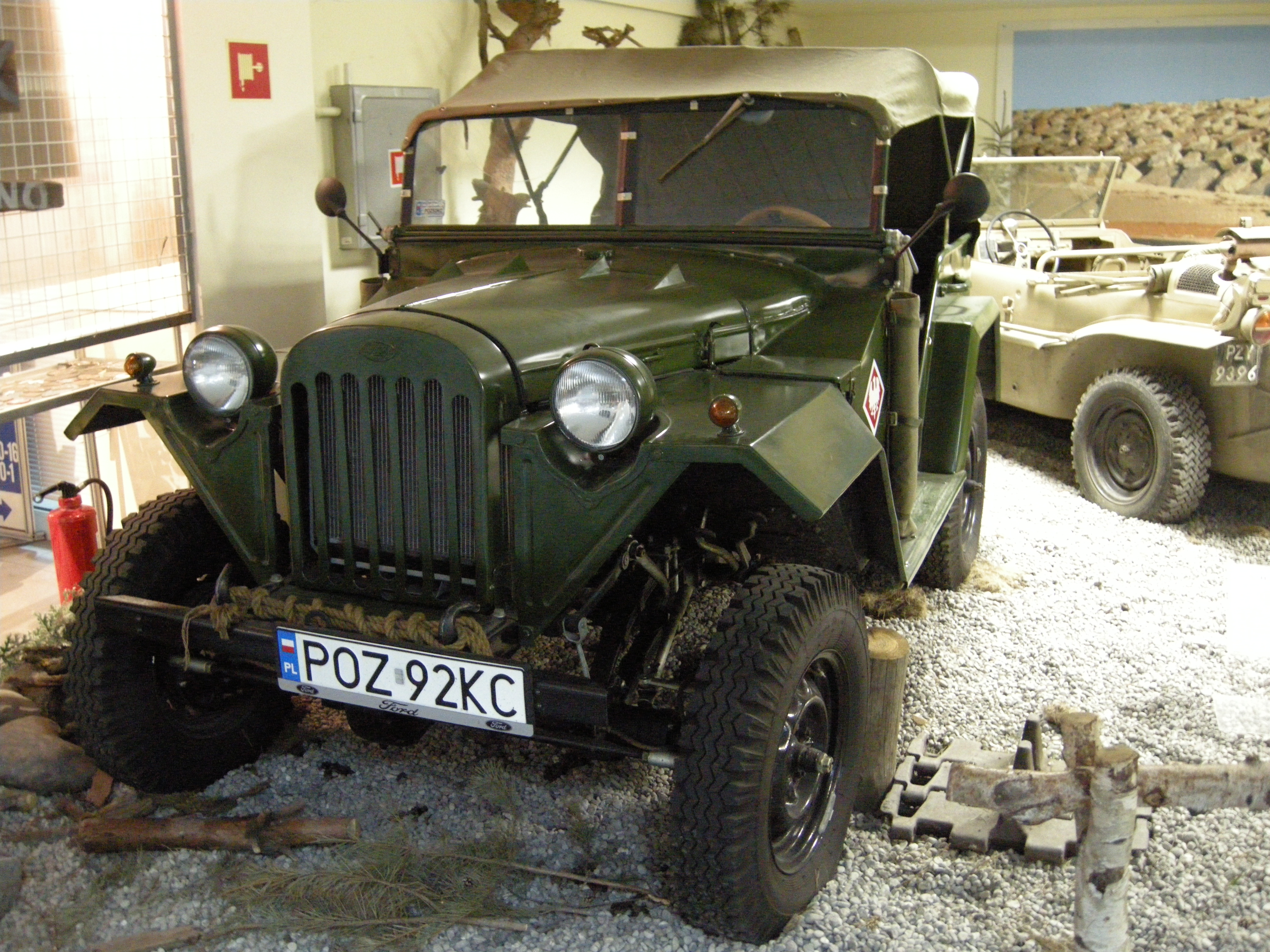 Samochód produkcji ZSRR GAZ 67 B z 1944 roku.